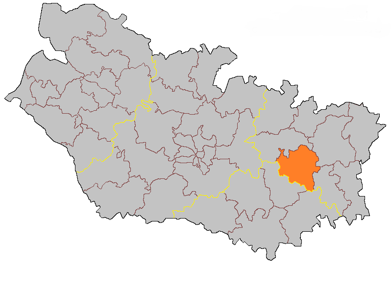 Кантон Шольн на карте департамента Сомма